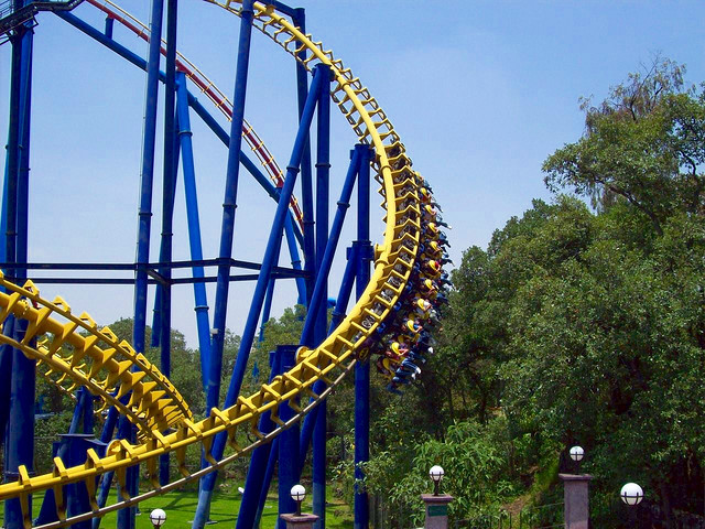 Montaña Rusa "Batman: the Ride" de SIx Flags México